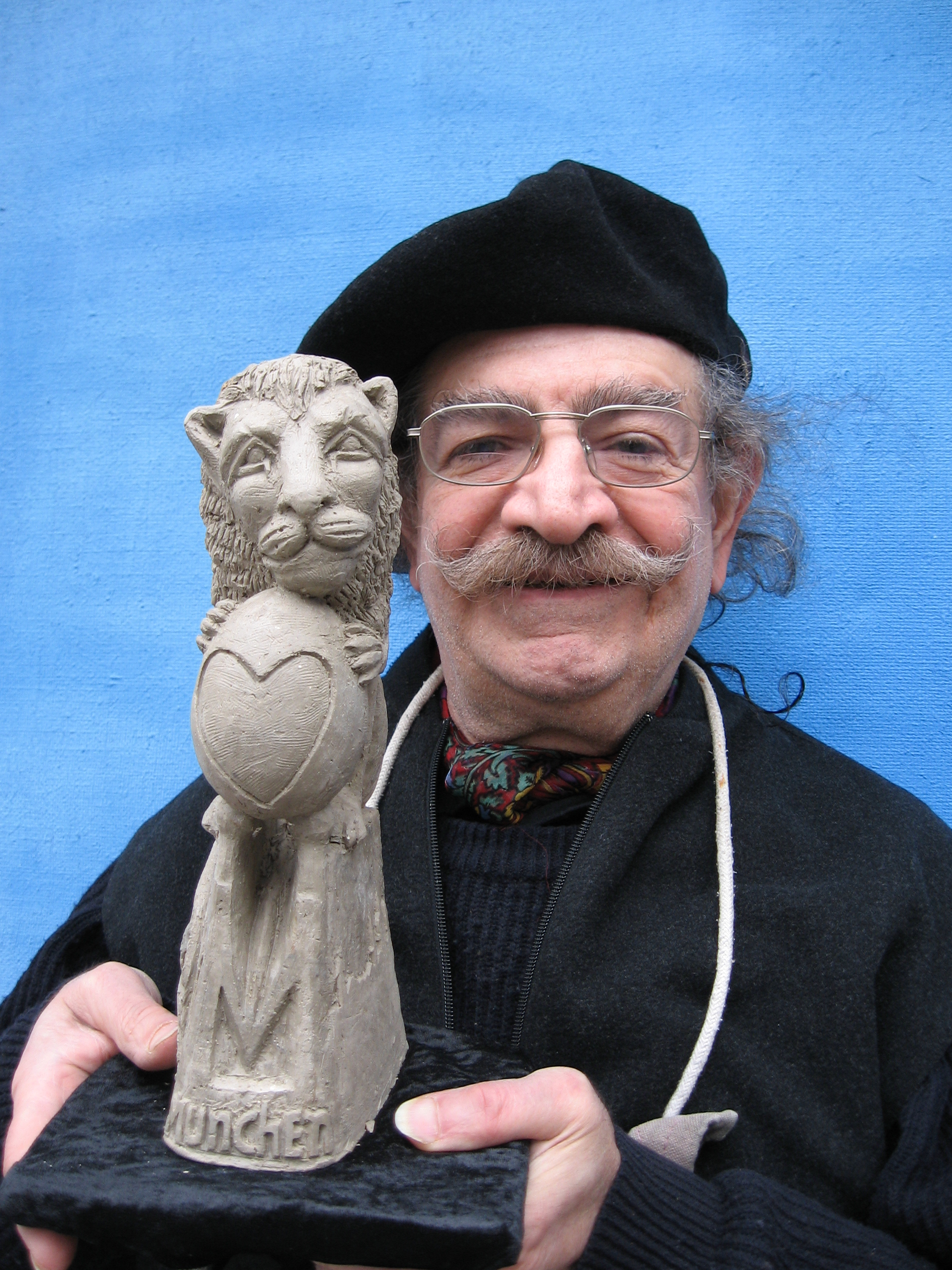 O.M. Bidjanbek mit dem "Geburtstagslöwen" zum 850. Münchner Stadtgeburtstag, 2008.